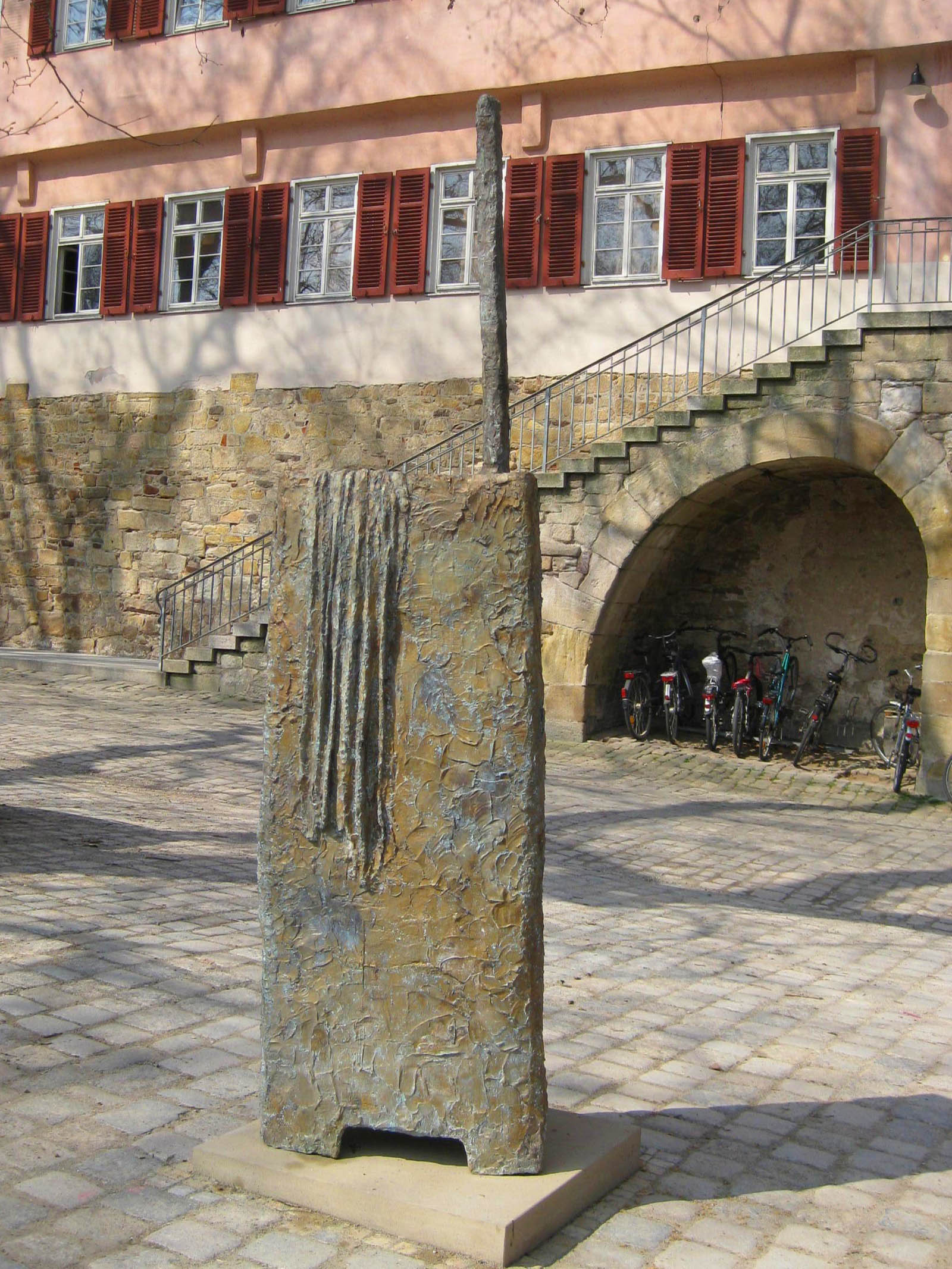 Johannes Kares: Denkmal für Lotte Zimmer (2011), Tübingen, Platz vor der Bursa